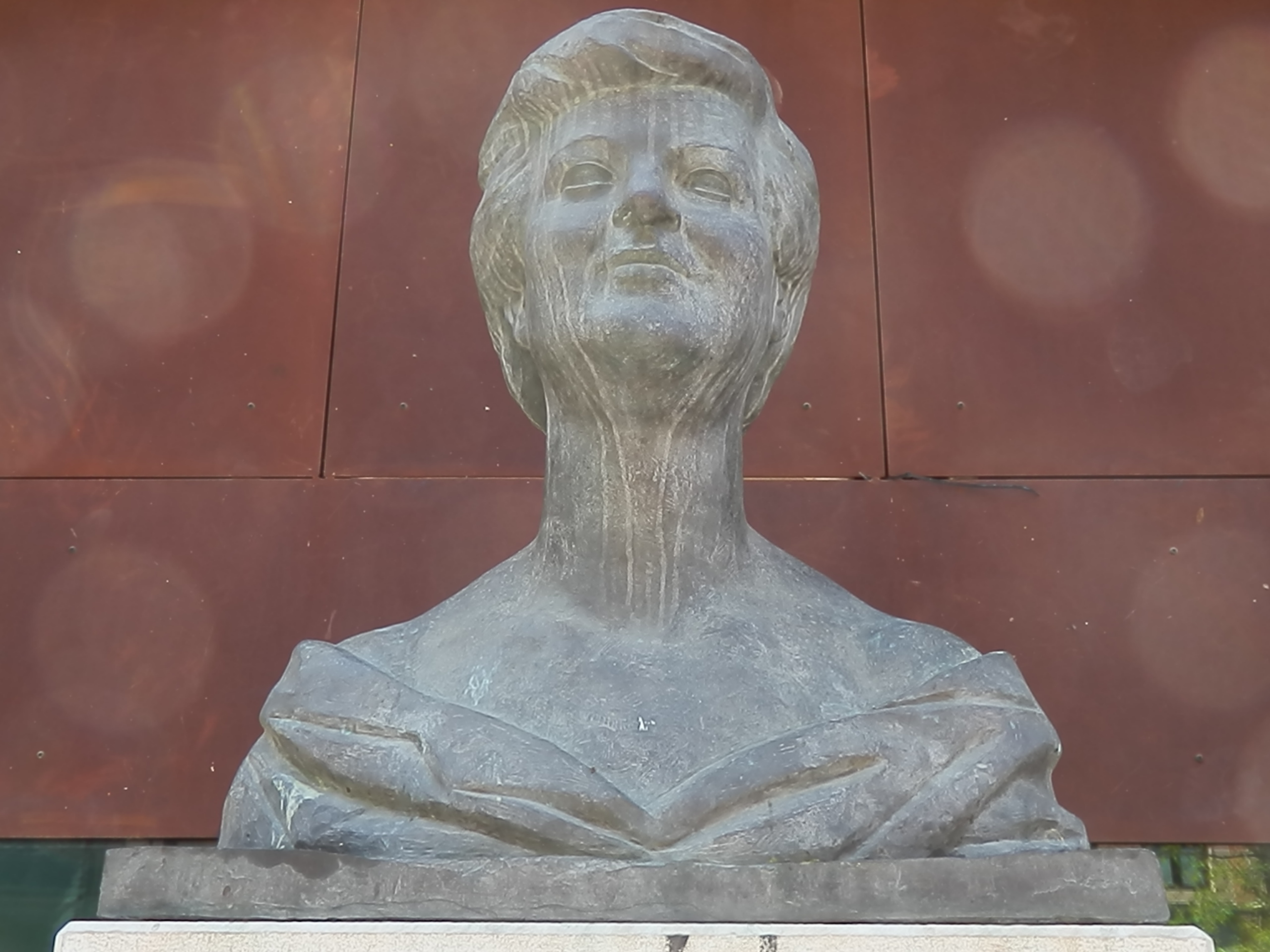 Estatua de Pilar Lorengar en Zaragoza.